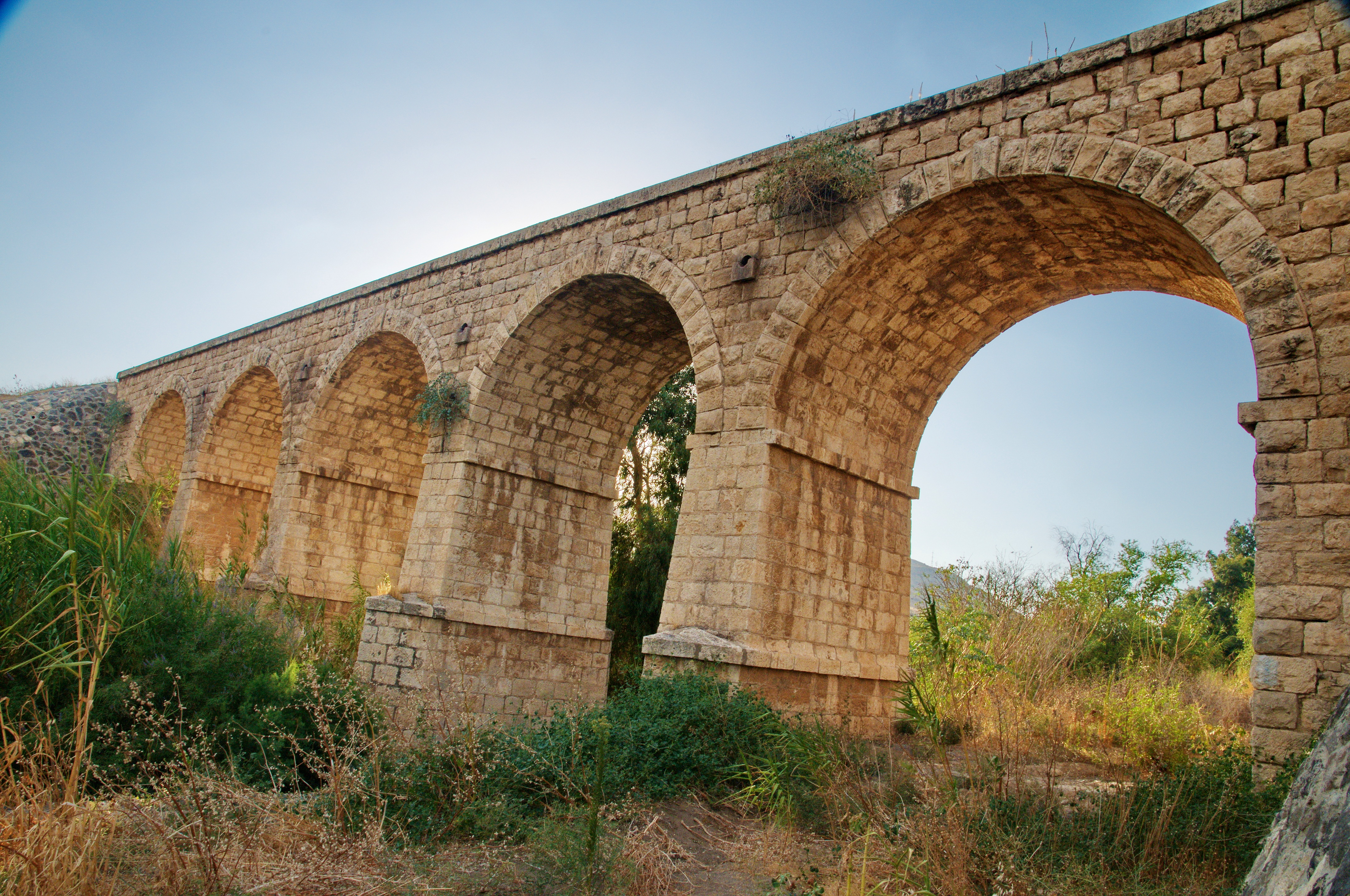 רכבת העמק - מעבירי מים והסוללה - צומת העמקים